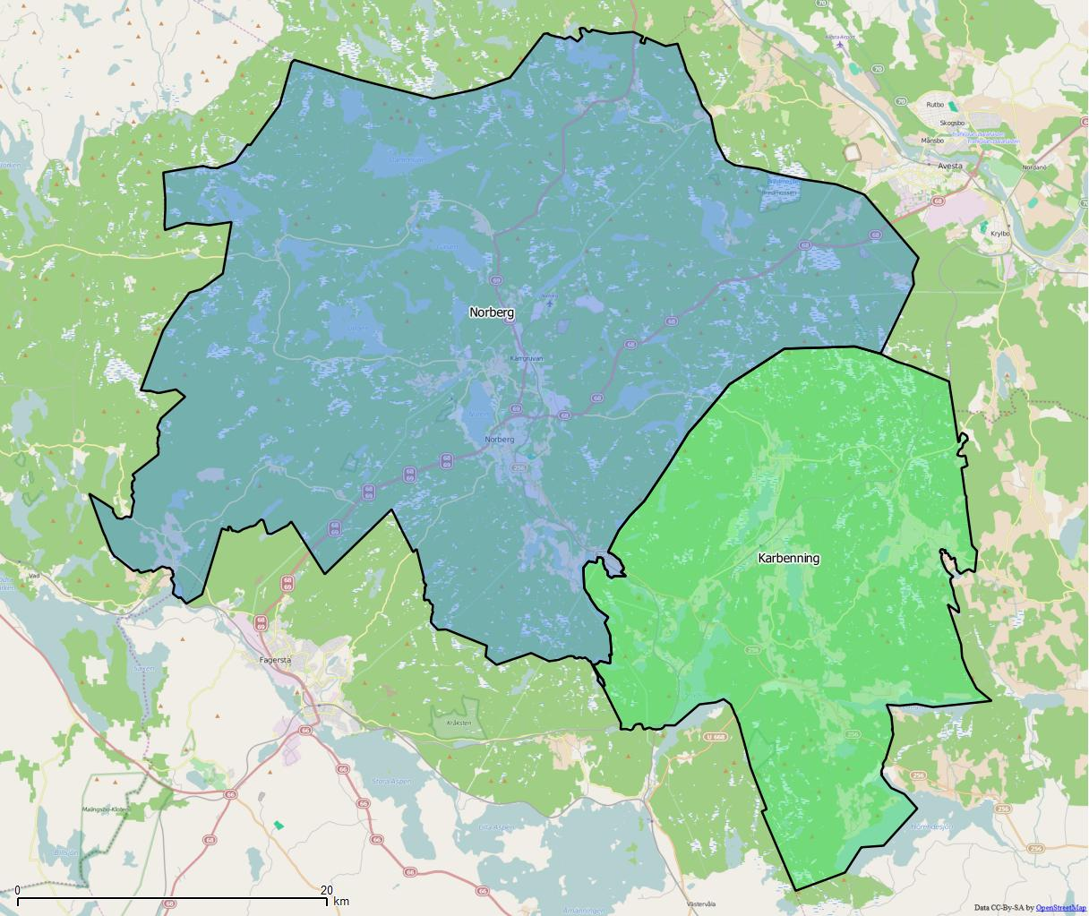 Distriktsindelningen i Norbergs kommun World file: 57.87663382071117013 0 0 -57.87663382071117013 1740015.21351254265755415 8443200.17588296346366405